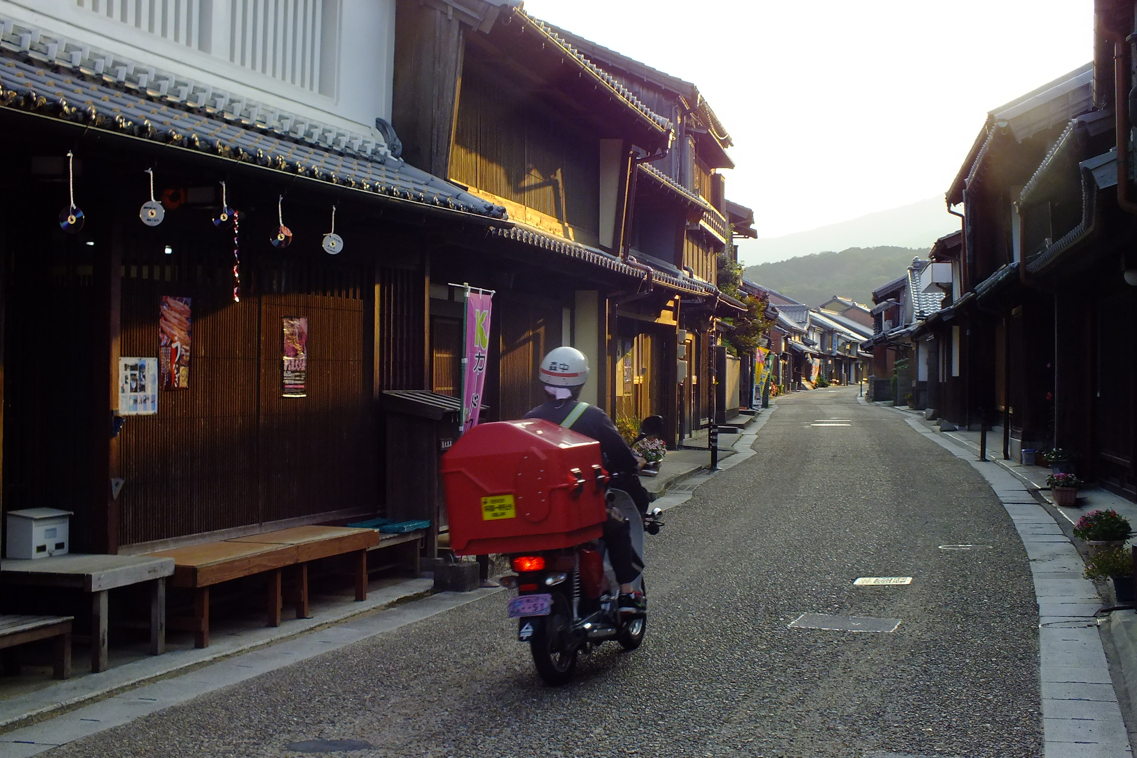 2016-08-05 Tokaido Seki Juku Kameyama City Mie,東海道五十三次 関宿